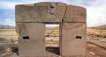 فف